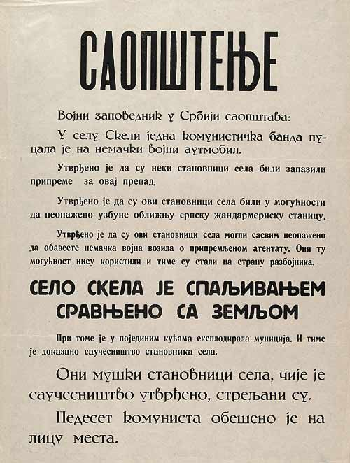 Srpskohrvatski / српскохрватски: Nemačko saopštenje o streljanju civila i spaljivanju selu Skela u okupiranoj Srbiji 1941. godine.